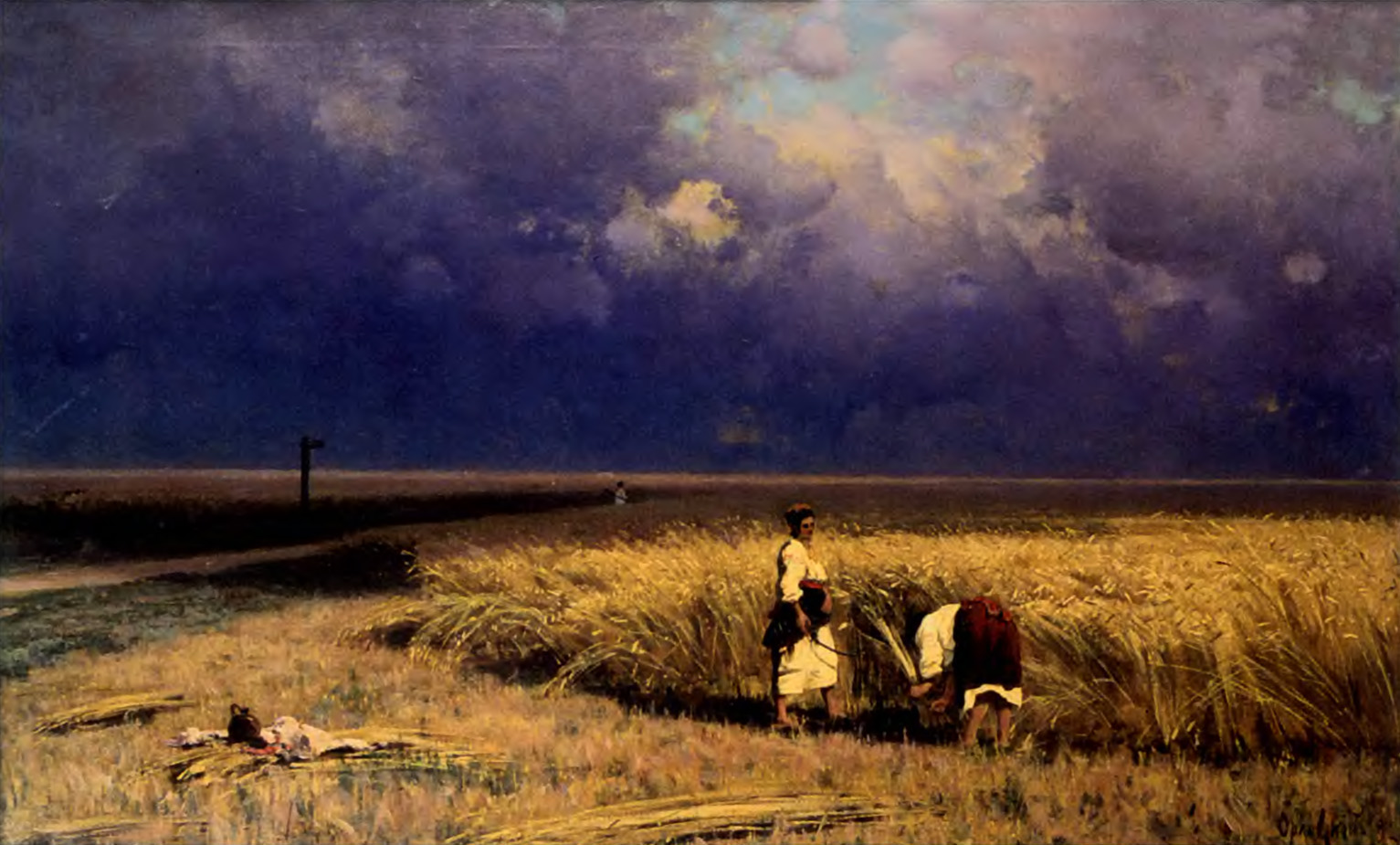 Harvestinglabel QS:Luk,"Жнива."